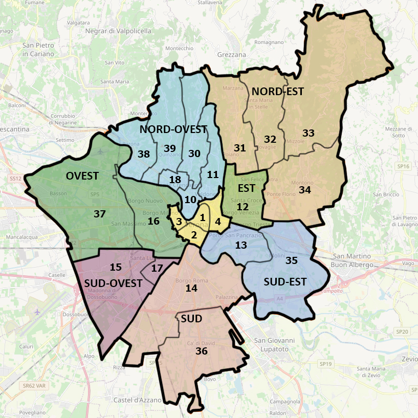 Quartieri e circoscrizioni di Verona Centro storico 1. Città antica 2. Cittadella 3. San Zeno 4. Veronetta Quartieri moderni 10. Borgo Trento 11. Valdonega 12. Borgo Venezia (che comprende Borgo Trieste) 13. Porto San Pancrazio 14. Borgo Roma 15. Santa Lucia 16. Borgo Milano (che comprende le località di Chievo e Saval) 17. Golosine 18. Ponte Crencano Frazioni 30. Avesa 31. Quinto 32. Santa Maria in Stelle 33. Mizzole 34. Montorio 35. San Michele 36. Cadidavid 37. San Massimo 38. Parona 39. Quinzano This map may be incomplete, and may contain errors. Don't rely solely on it for navigation.